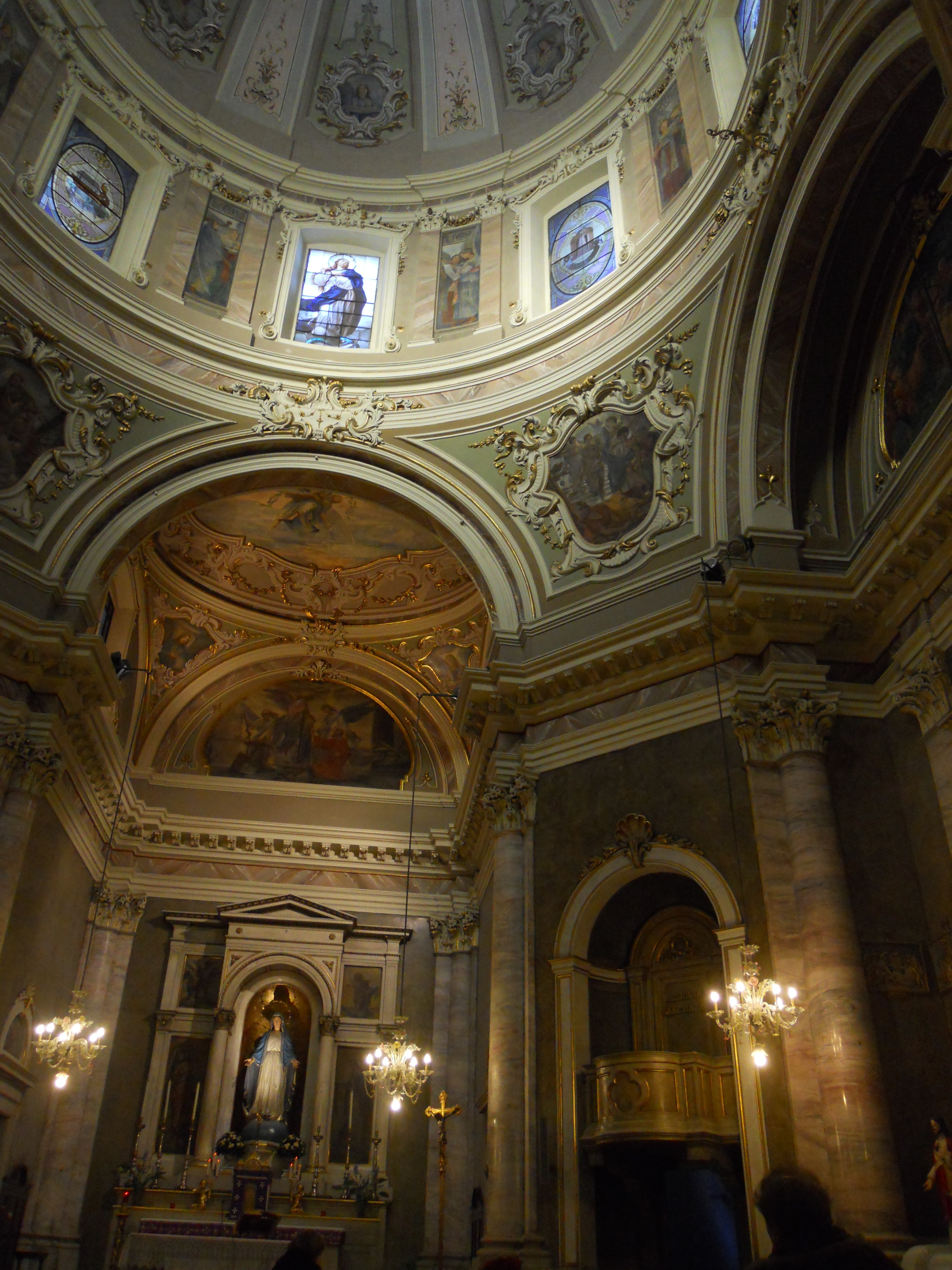 chiesa di san luca (Brescia) interno